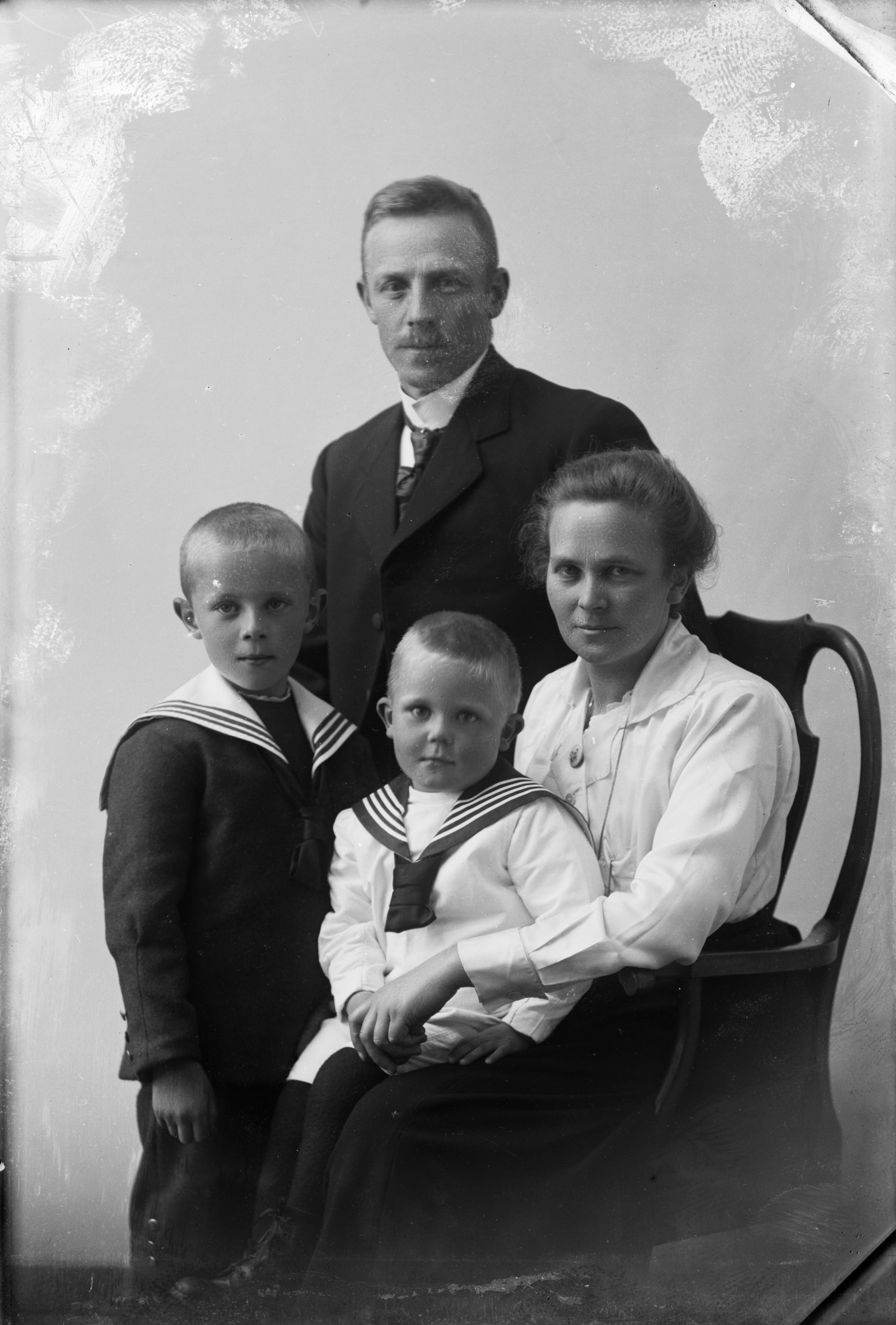 Lars Pedersen Borten (1882–1965), gårdbruker i Flå, og hustru Karen Arntsdatter Kaasen (1884–1958) med sønnene Per (1913–2005) og Arnt (1916–1969) (på fanget).